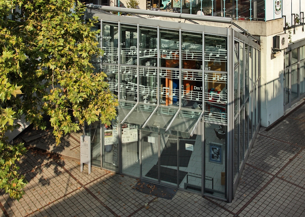 Blick auf das "Haus der Musik" (Eingangsbereich) in Wernau (Neckar) am Bahnhofsvorplatz